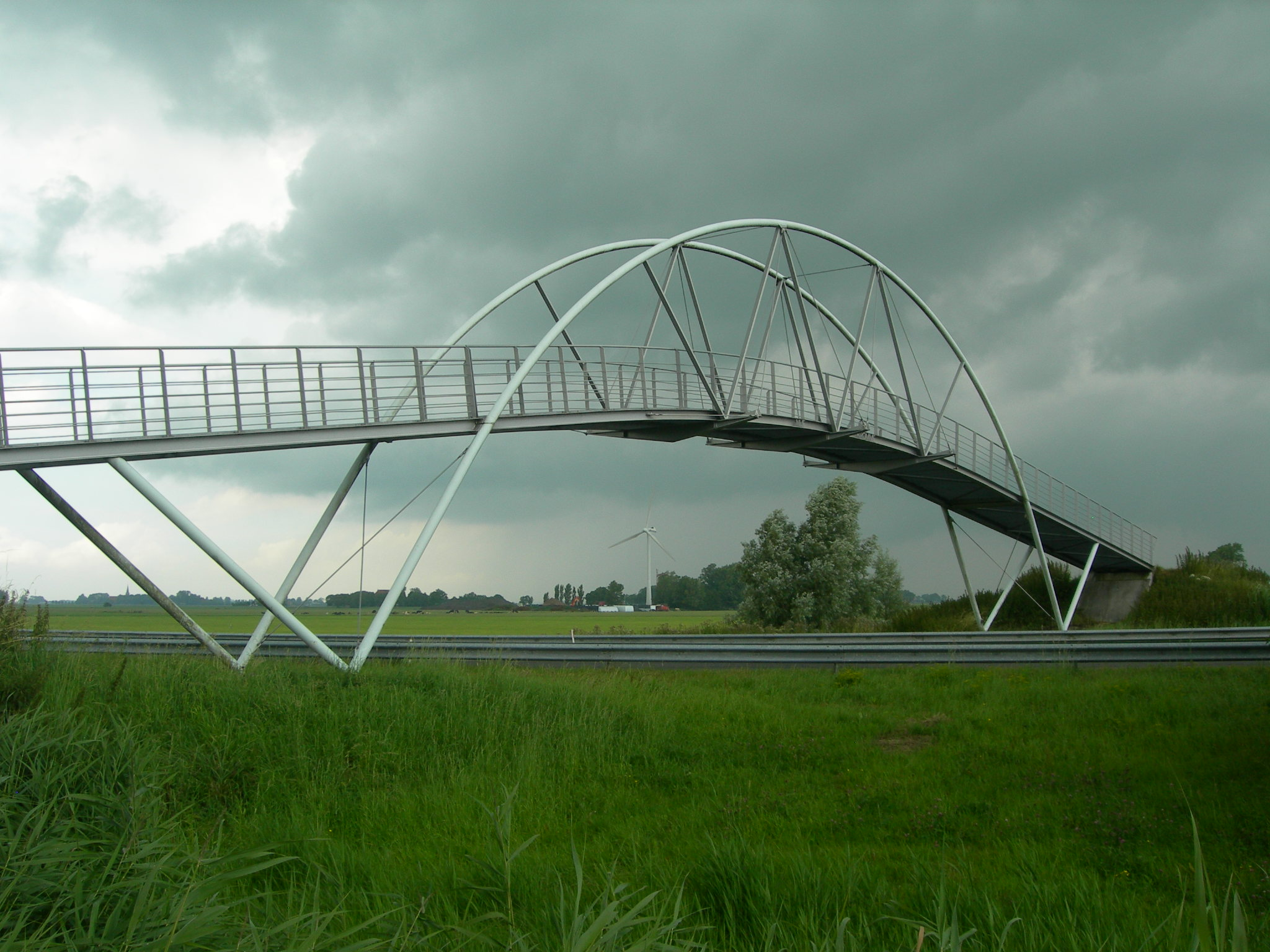 Brug Nije Kromme (De Slachtebrêge)- Wommels